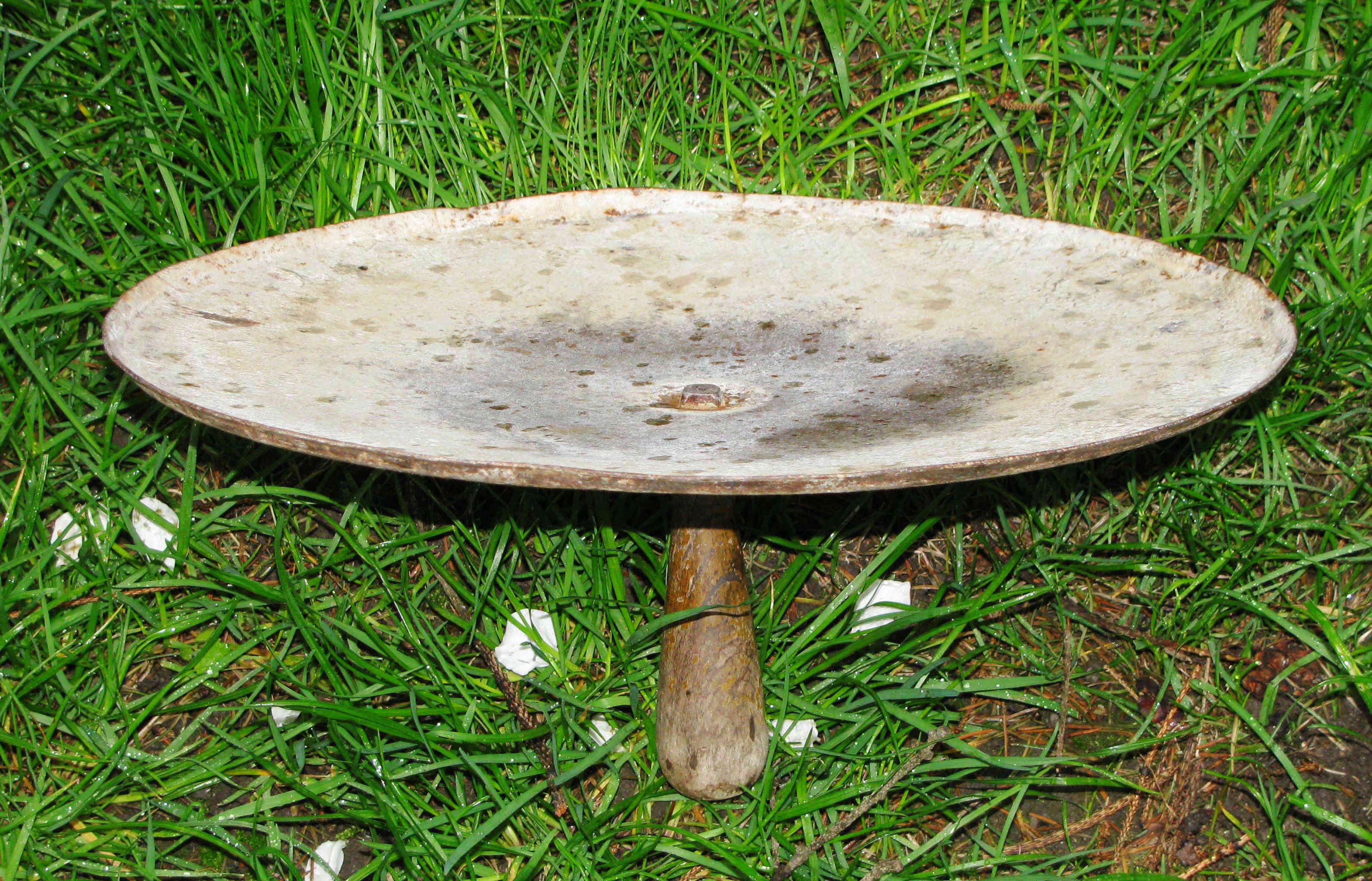 Česky: Omítkářský talíř průměru 320 mm